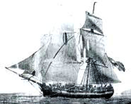 Gravure du XIXéme siècle représentant le brigantin Guerrero